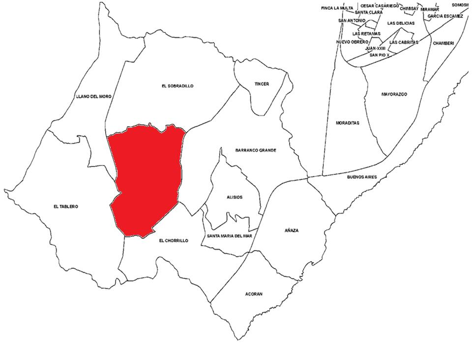 Localización de La Gallega en el distrito Suroeste